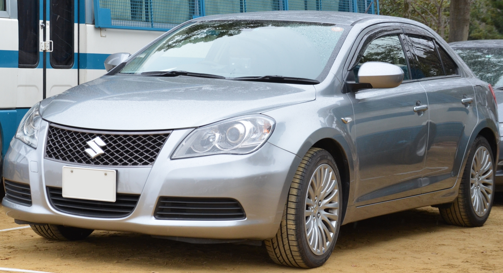 キザシの覆面パトカー